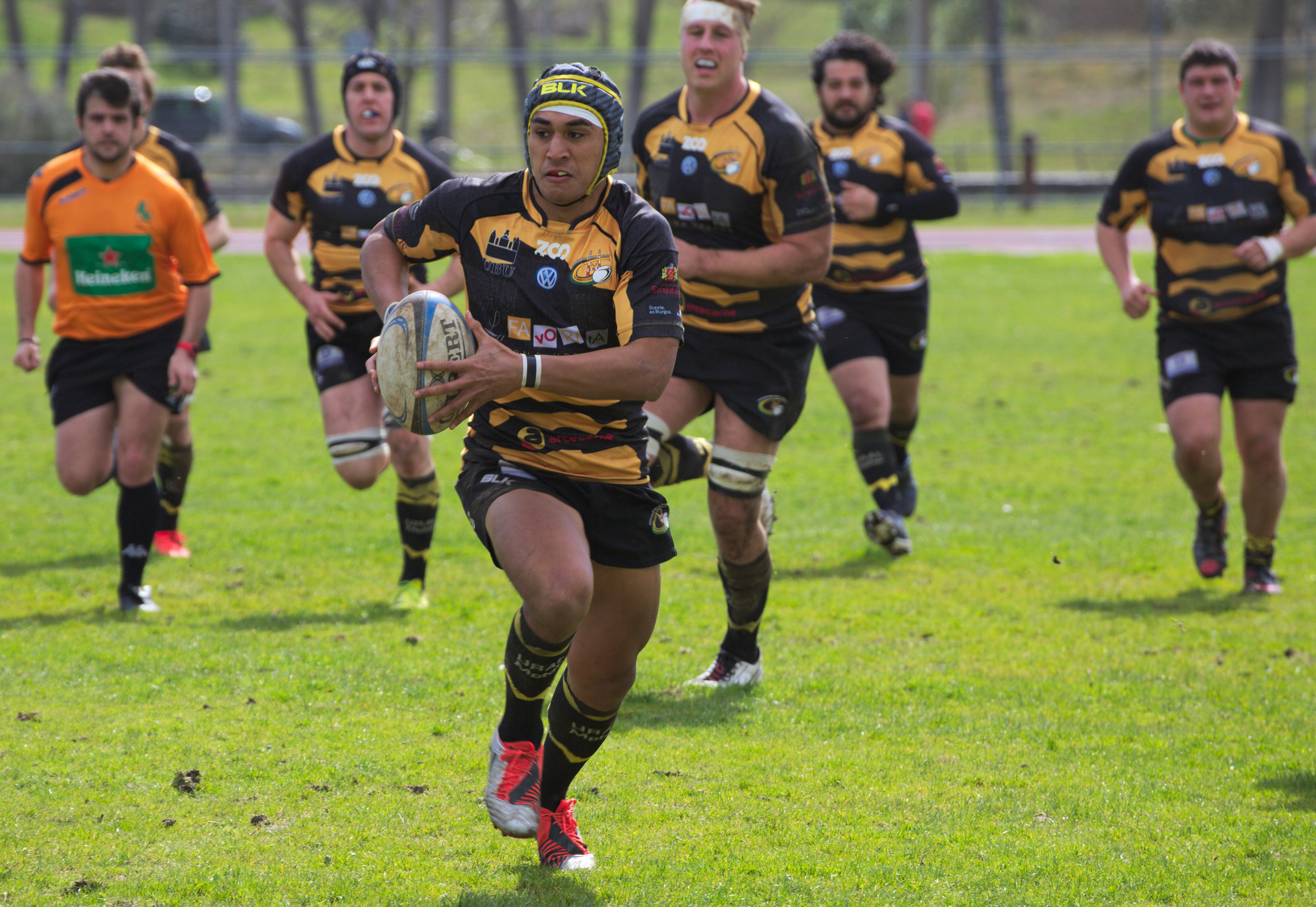 Kaleido Universidade de Vigo RC - UBU Colina Clinic, 12 March 2017 División de Honor B - Grupo A